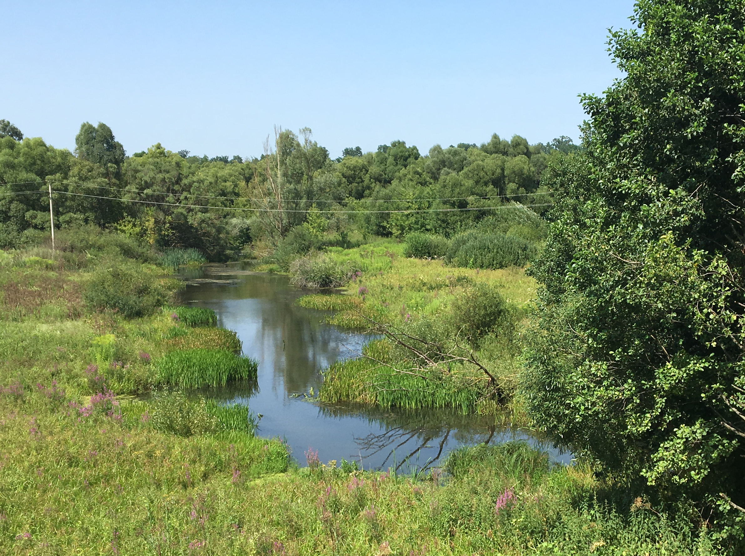 Речица в селе Долбёнкино